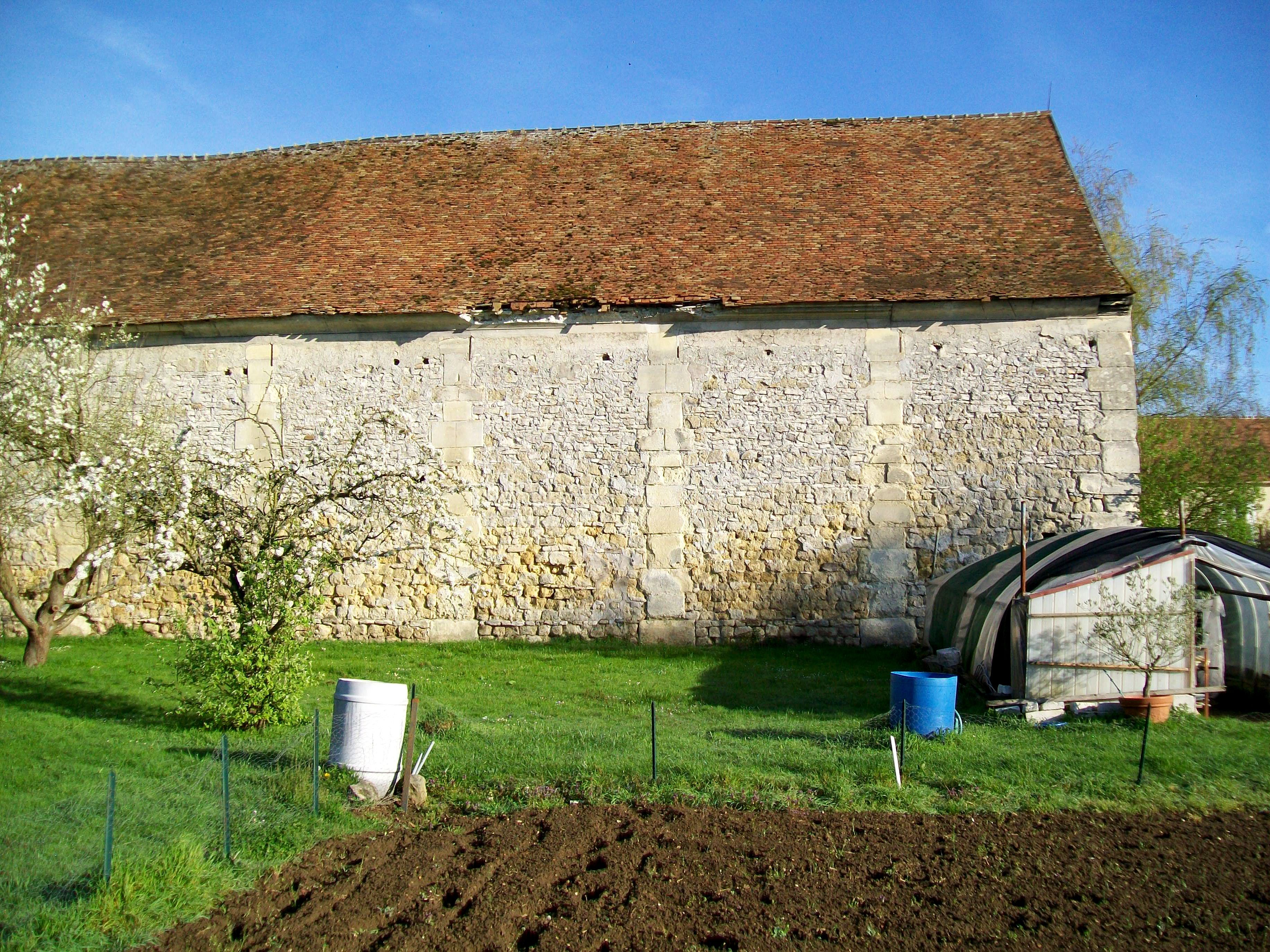 Vue partielle de la façade sud d'une grange construite à la fin du XVIIIe siècle, à l'emplacement d'une ancienne grange dîmière appartenant à la ferme du Temple, Puiseux-en-France, Val-d'Oise.